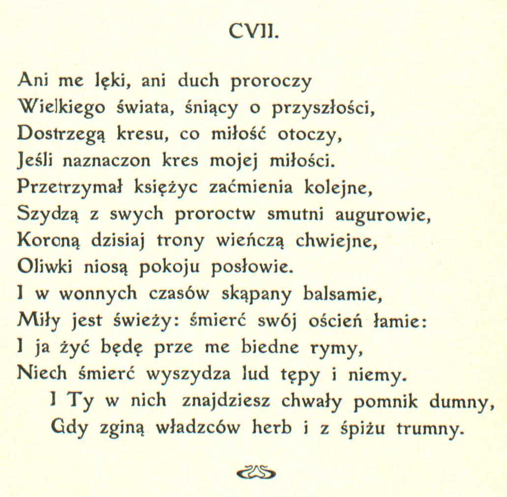 Sonety Shakespeare'a I-CXXXIV i CXXXVII-CLIV tłumaczenie Maria Sułkowska (MUS) sonet 107 strona 121